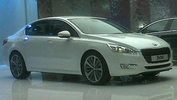 Peugeot 508